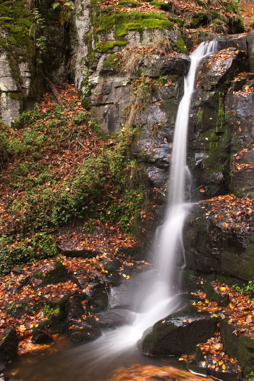 Starohutiansky (nazývaný aj Starohutský) vodopád fotografovaný s dlhou expozíciou na jeseň 2017